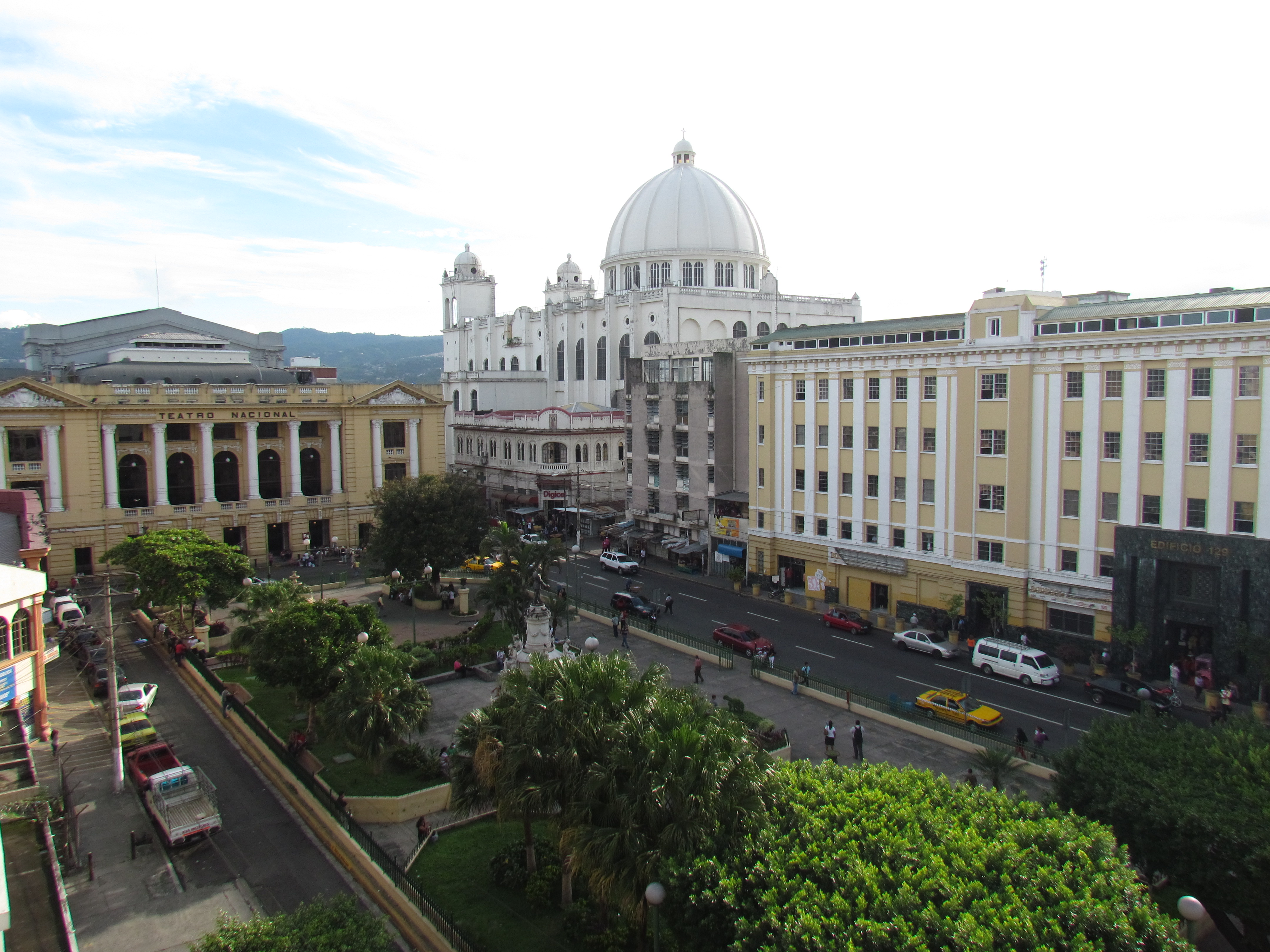 Vista de una de las principales fachadas del Centro Histórico de San Salvador, donde podemos admirar el teatro nacional y las calles que lo rodean.